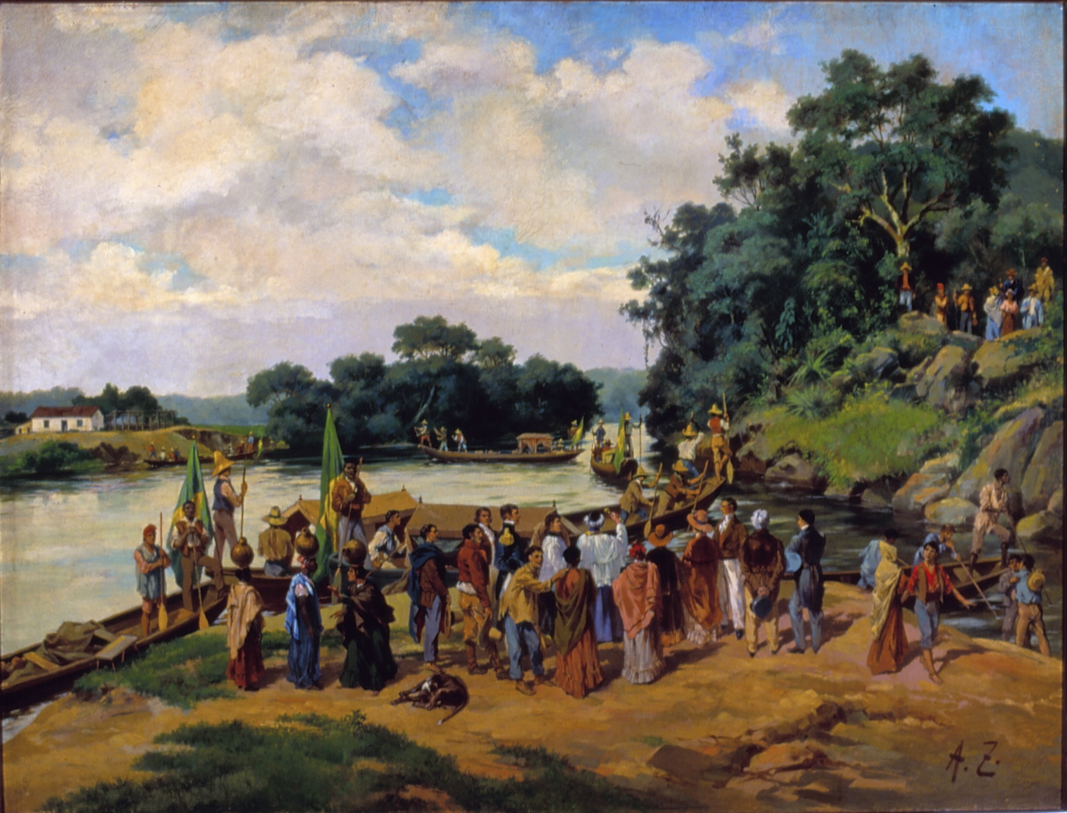 Obra que integra o acervo do Museu Paulista da USP.